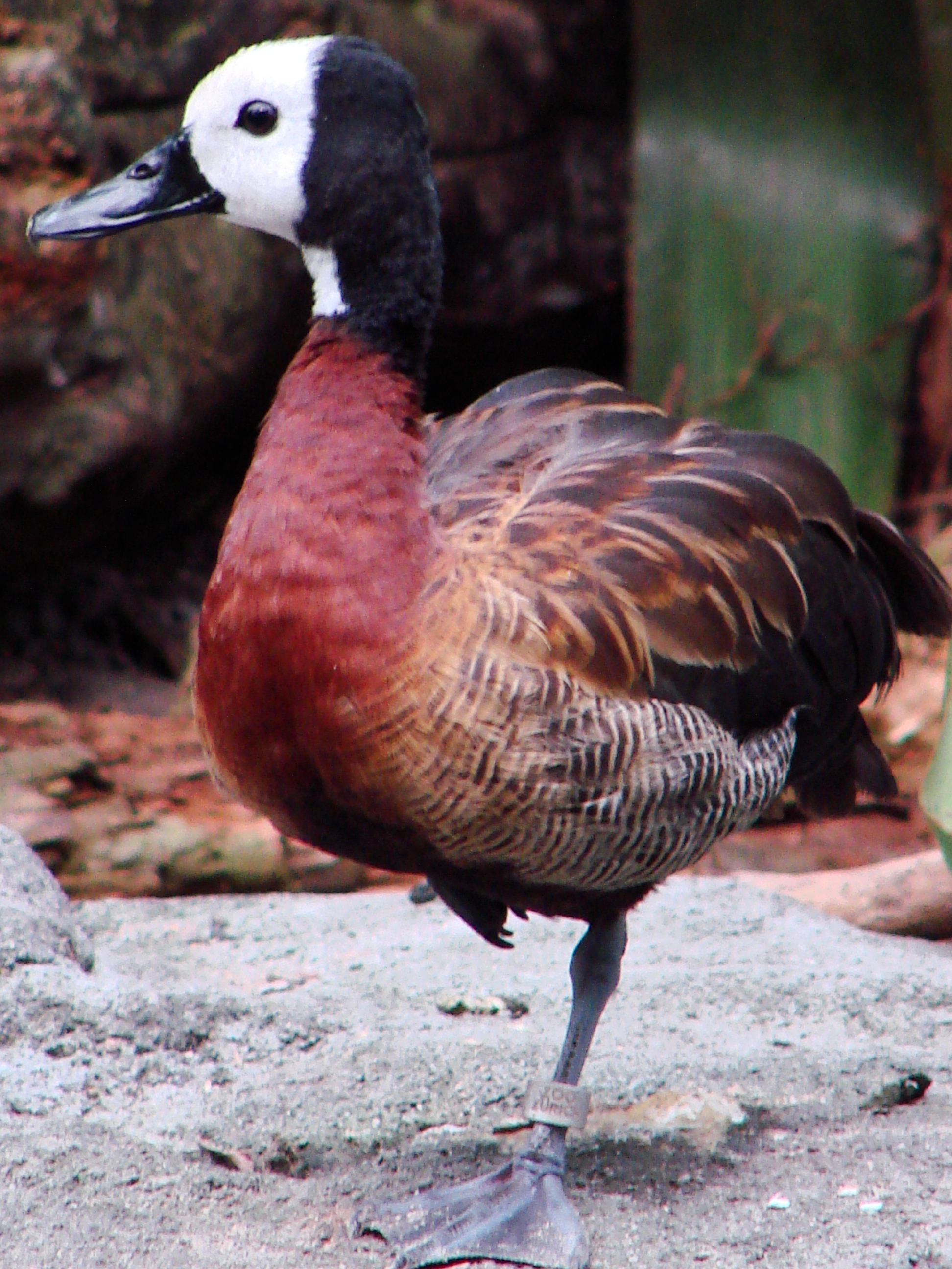 Dendrocygne veuf (Dendrocygna viduata)